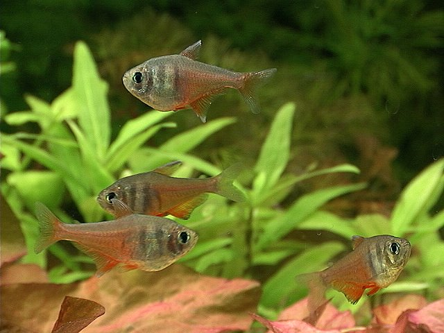 tetra